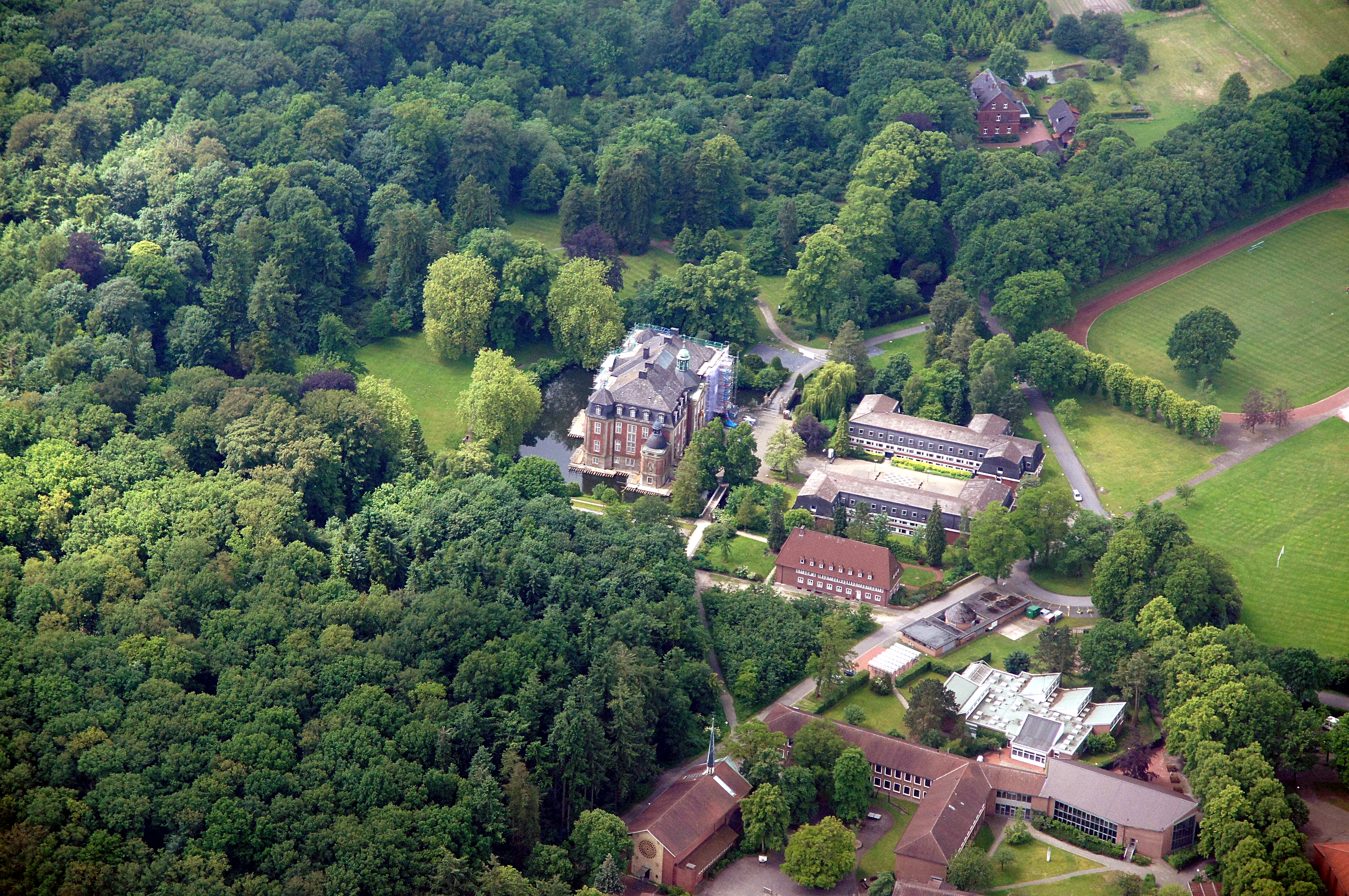 Schloss Loburg bei Ostbevern, Kreis Warendorf, NRW. Das Bild entstand während des Münsterland-Fotoflugs am 1. Juni 2014. Hinweis: Die Aufnahme wurde aus dem Flugzeug durch eine Glasscheibe hindurch fotografiert.